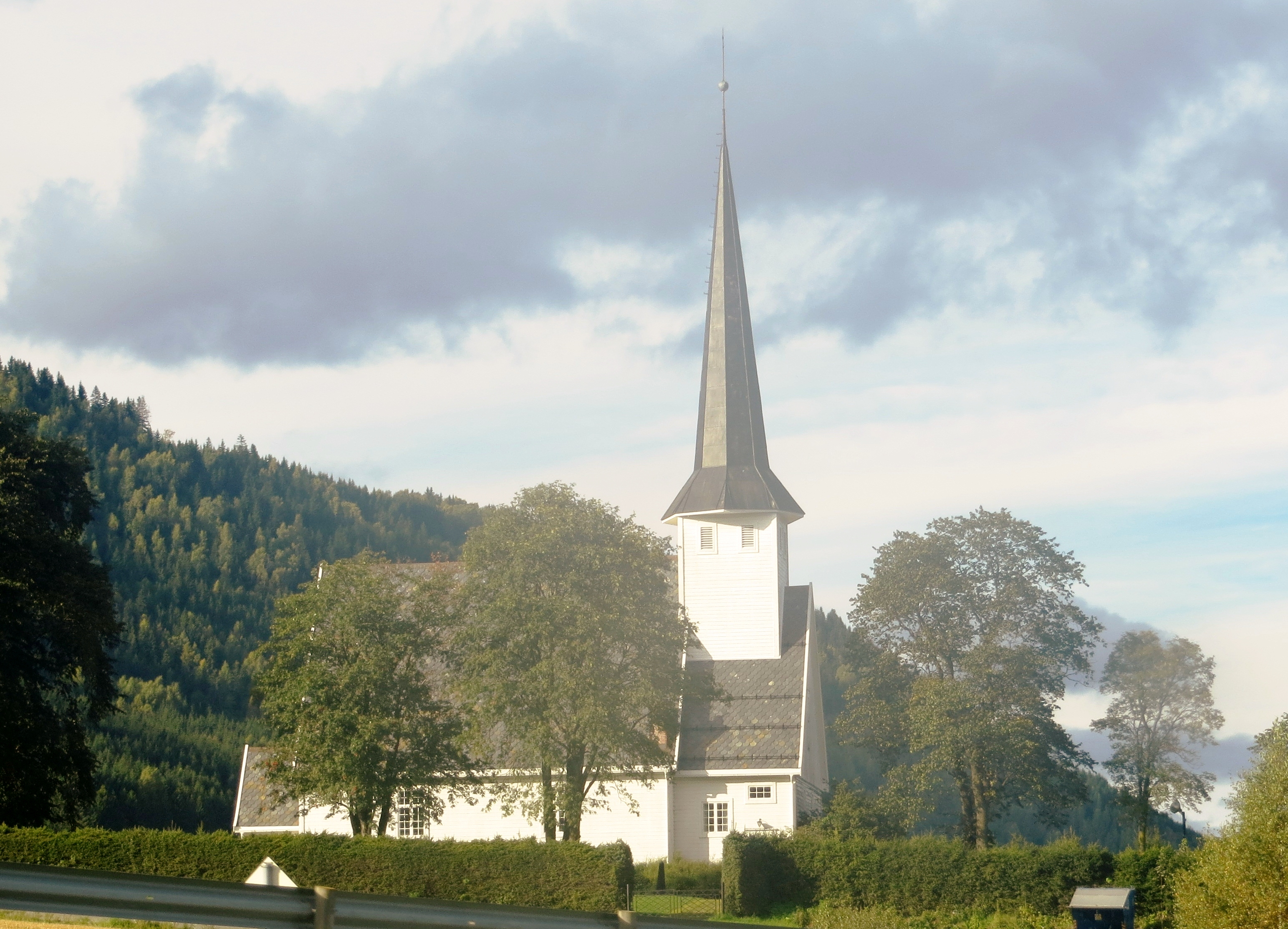 Vingrom church, Lillehammer, Norway